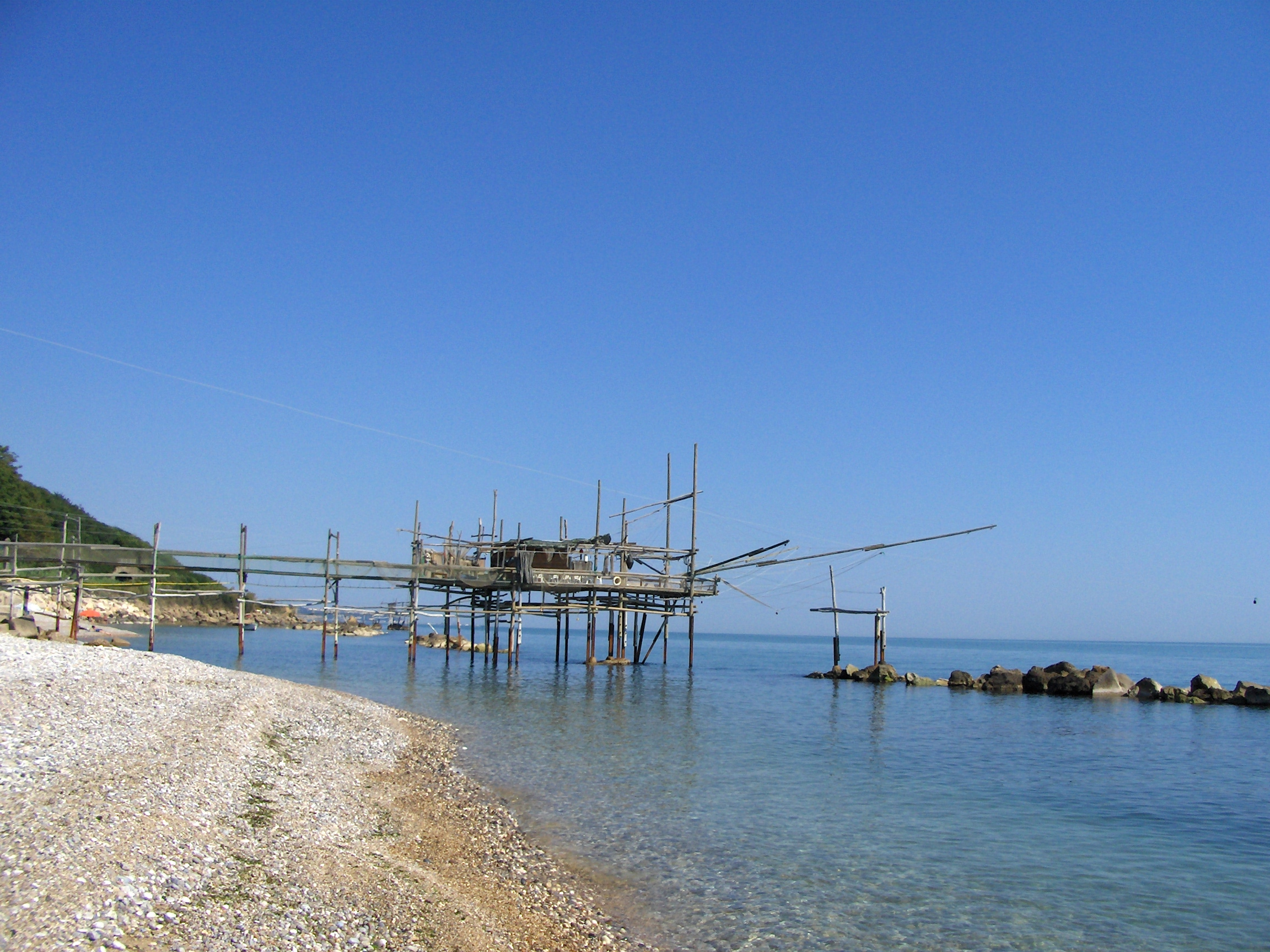 Uno dei trabocchi presenti lungo la costa della Marina di San Vito Chietino.